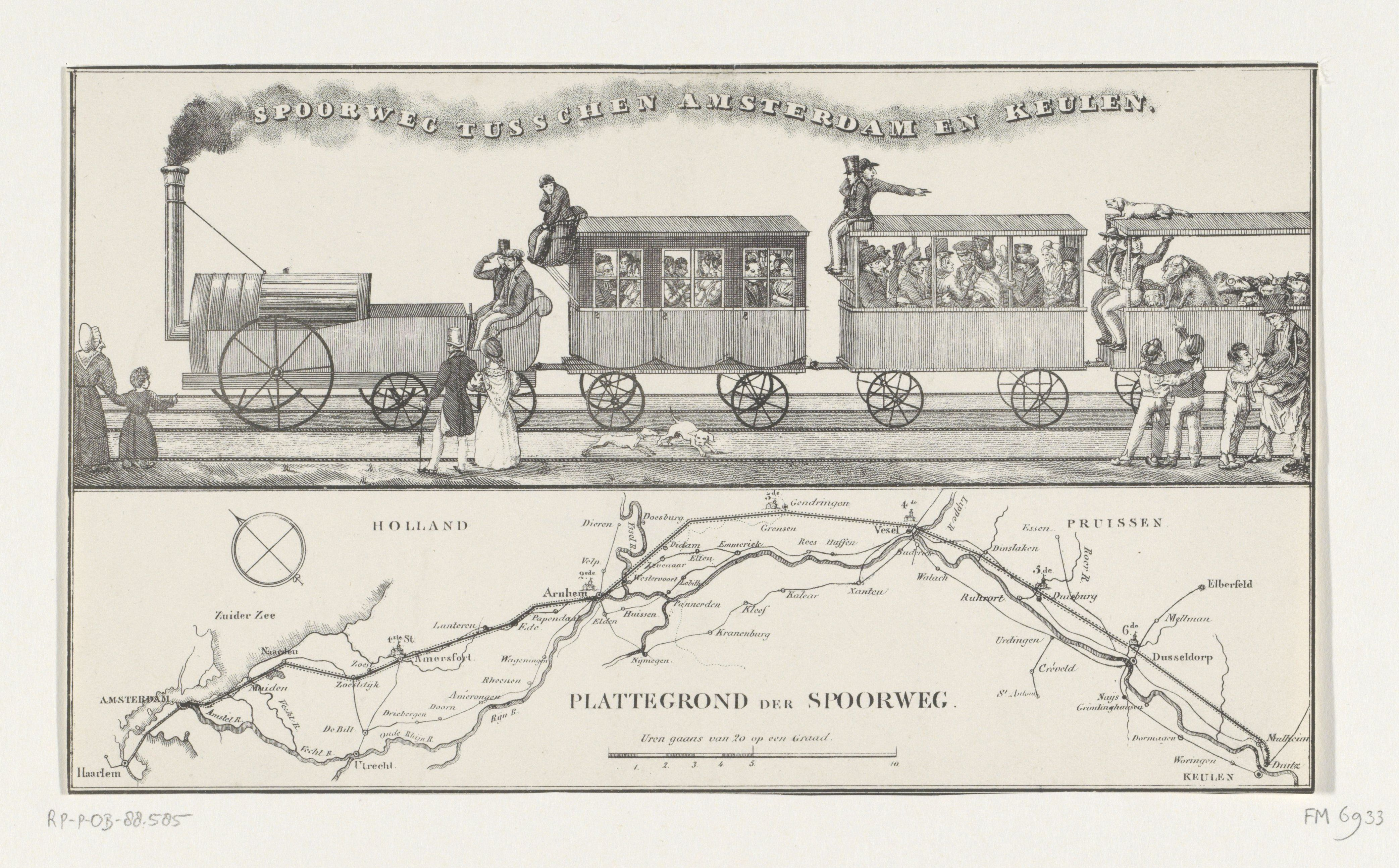 Plan voor het aanleggen van een spoorweg tussen Amsterdam en Keulen door luitenant-kolonel William Archibald Bake (met A. Willink en D. Borski), 21 augustus 1834. Bovenaan een afbeelding van een primitieve stoomlocomotief met twee passagierswagons en een veewagon. Daaronder een kaartje van de loop van de geplande spoorlijn. Dit exemplaar zonder de bijbehorende teksten.